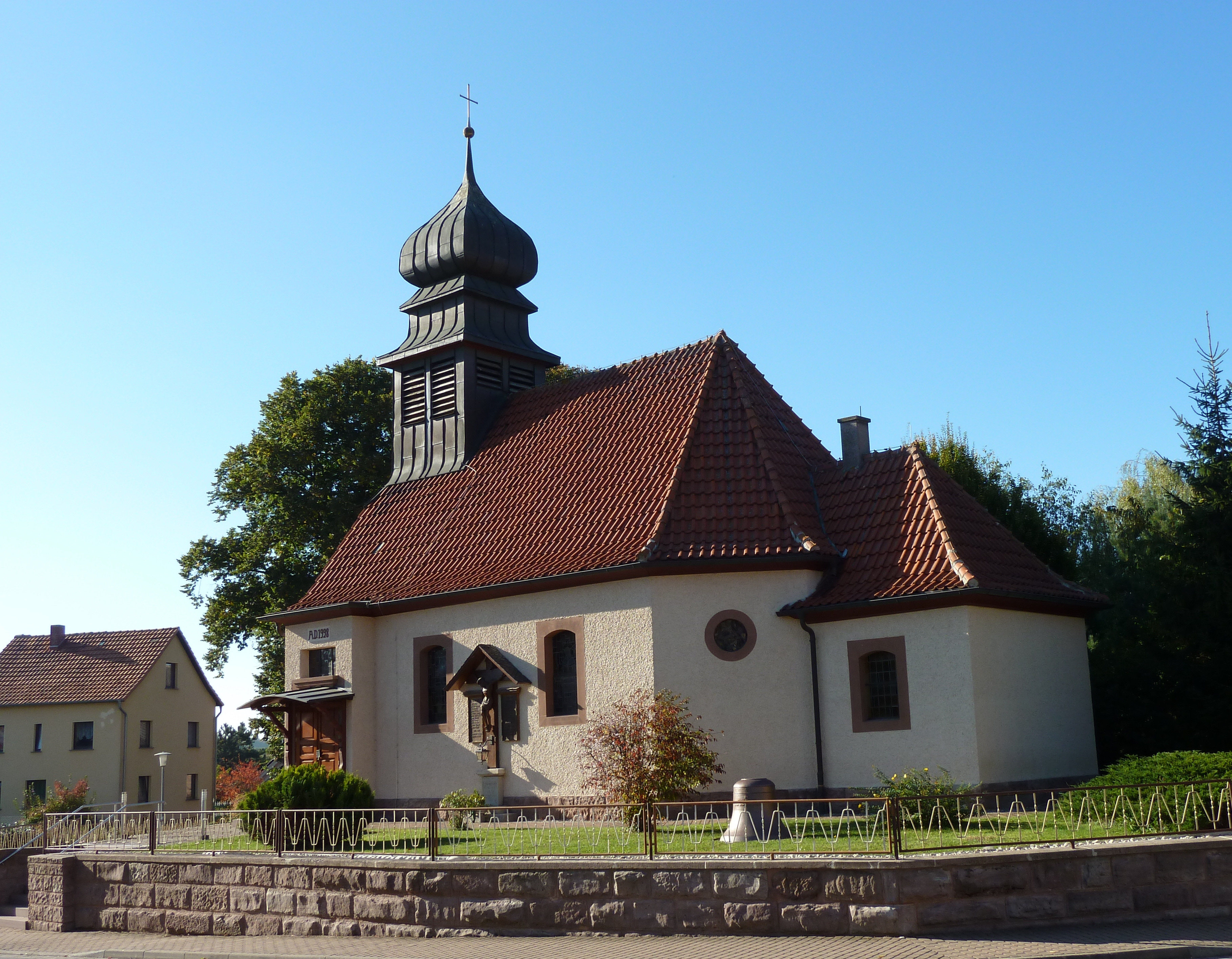 Katholische Kirche St. Alban in Steinheuterode, Landkreis Eichsfeld. Erbaut 1928 lt. Schrift über dem Eingang